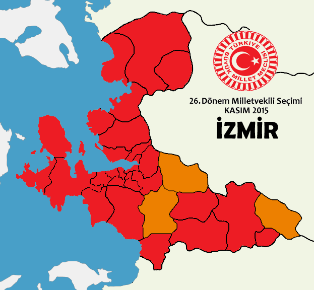 Kasım 2015 seçimleri